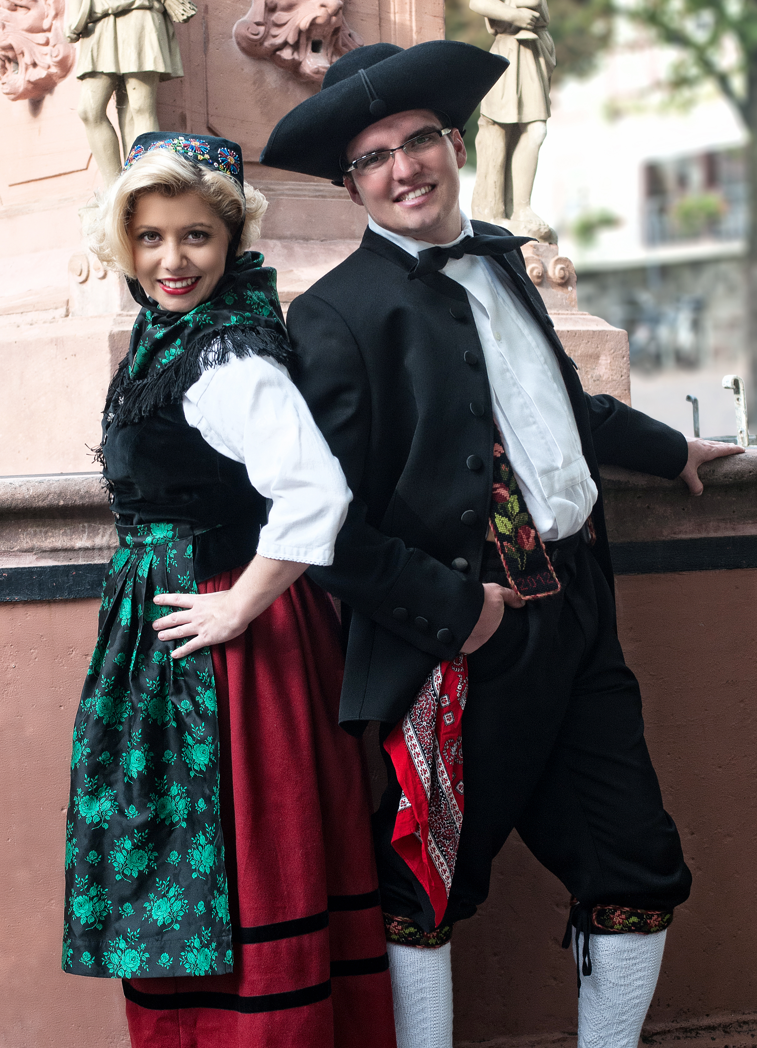 Hessentagspaar des Hessentags 2014 in Bensheim